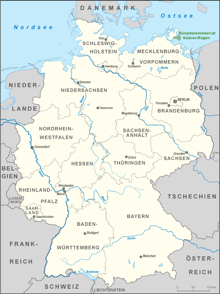 Karte des Biosphärenreservates Südost-Rügen in Deutschland